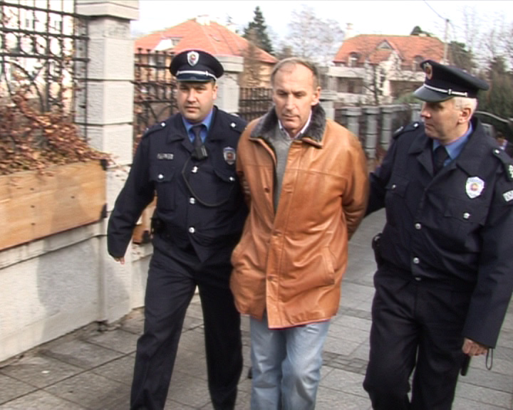 Dragan Dzajic priveden je i lisen slobode 05.02.2008.godine u svojoj kuci u Beogradu. Autor fotografije: Dragan Žebeljan